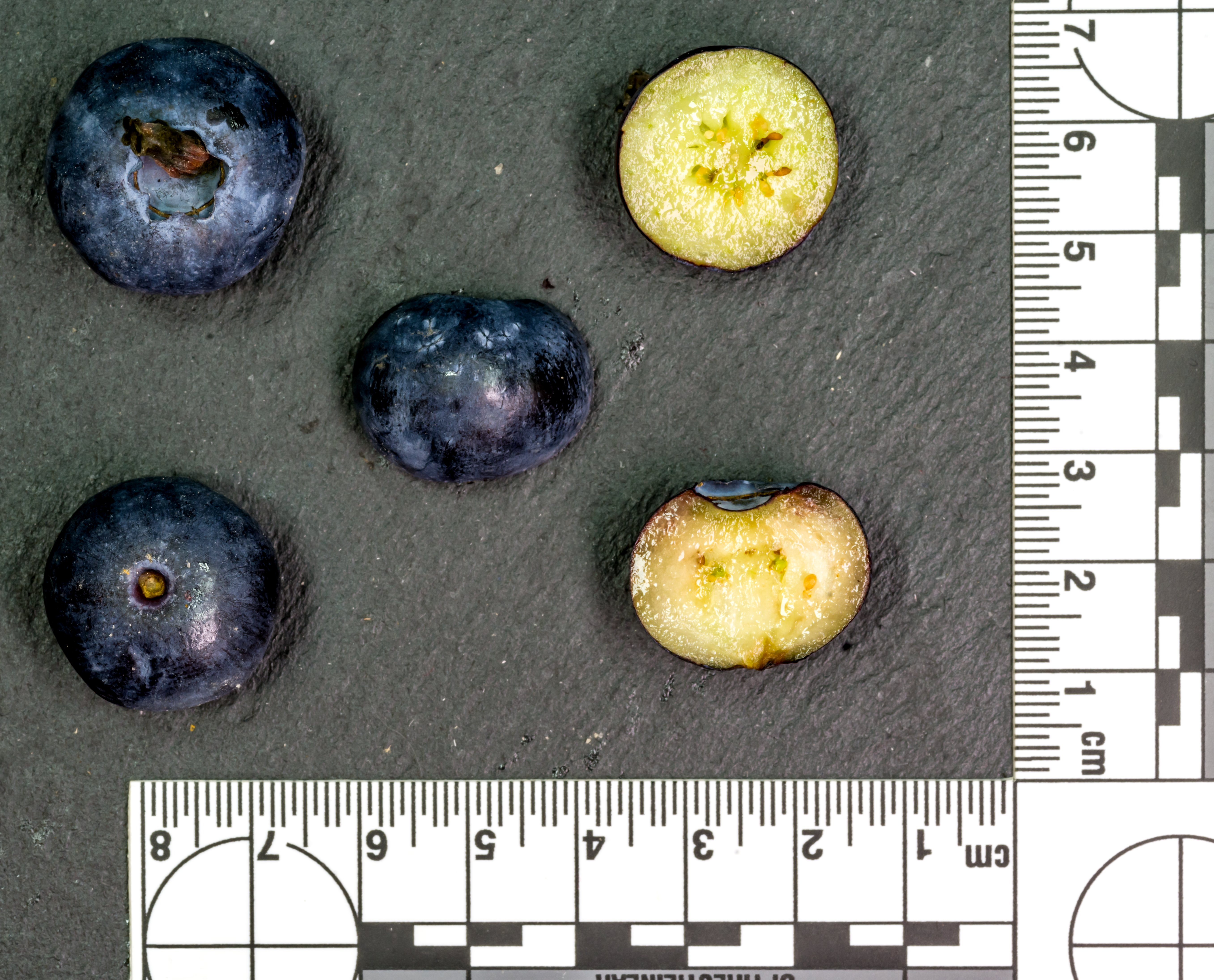 Querschnitt durch eine Kulturheidelbeere